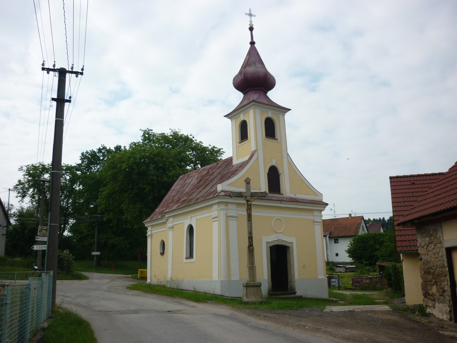 Kaple Nanebevzetí Panny Marie v Děbolíně